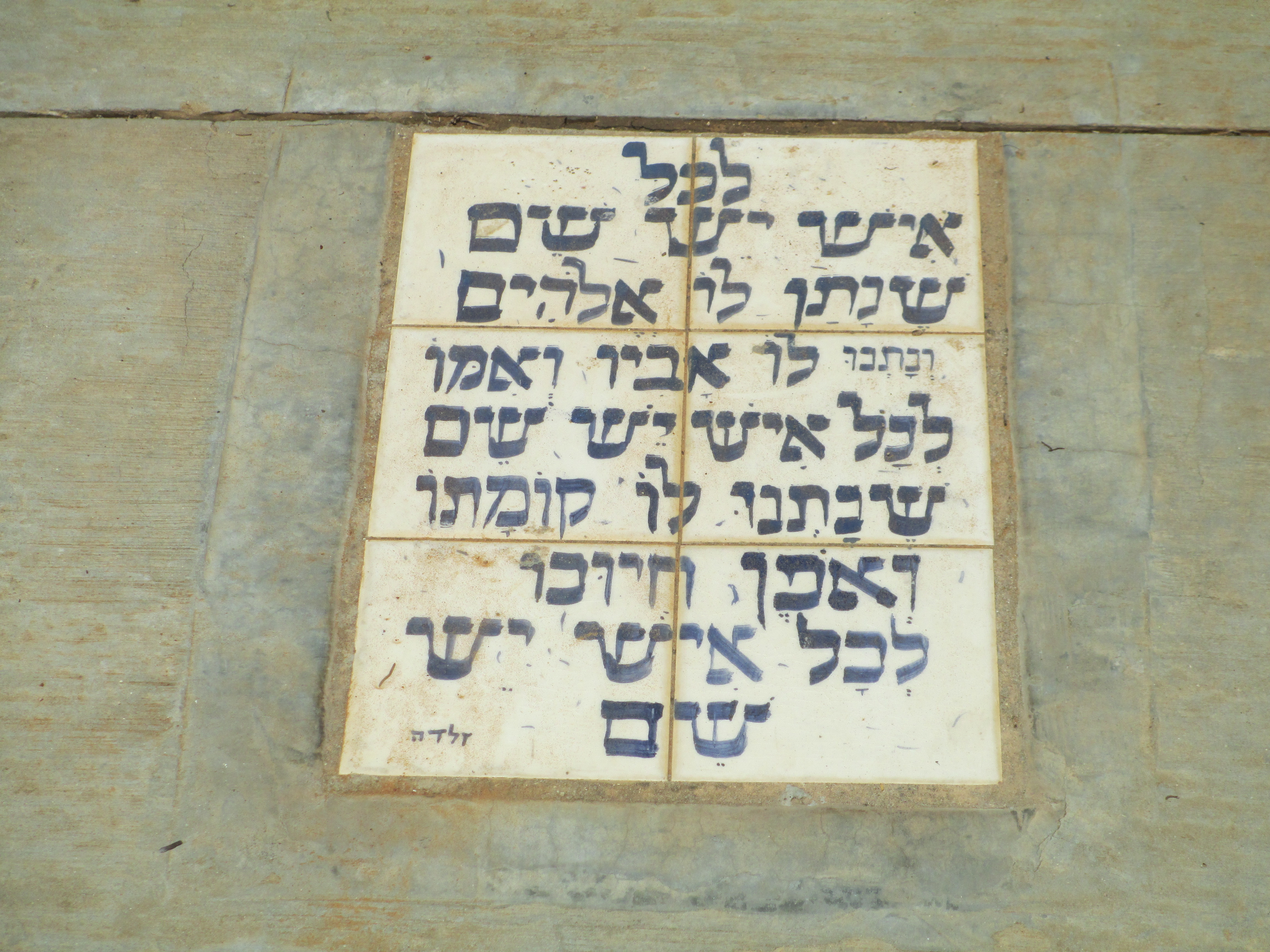 הכתובת "לכל איש יש שם" בבית הקברות בקיבוץ שפיים